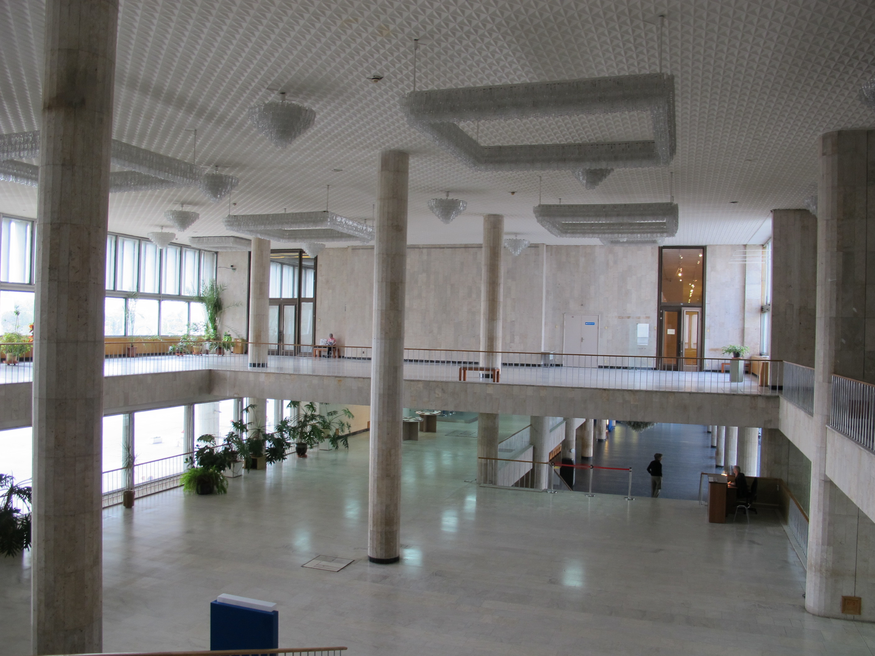 Tret'jakov modern, interno